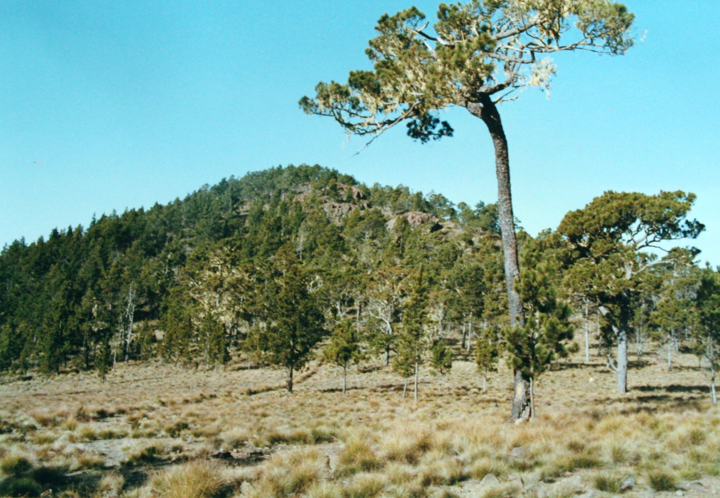 Pico Duarte in der Dominikanischen Republik, 1986